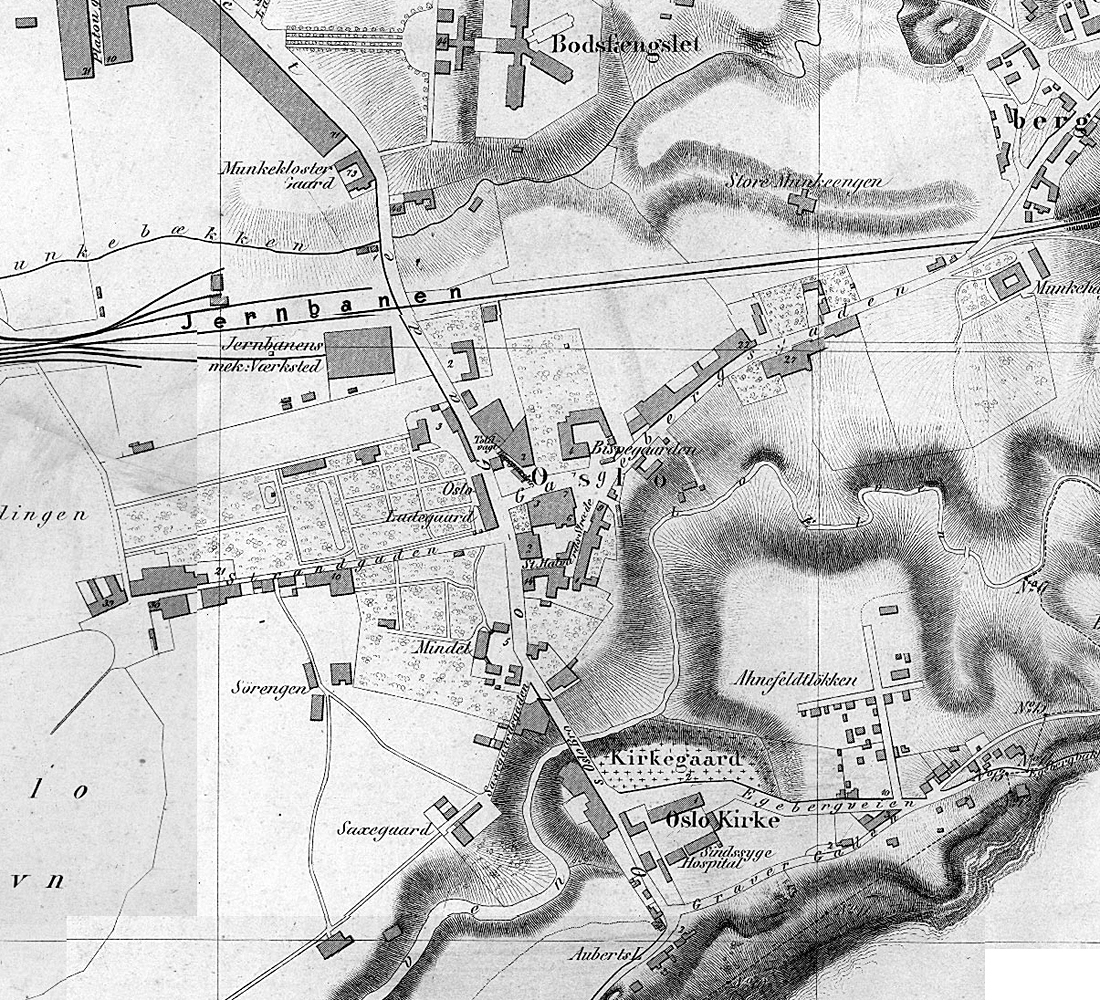 Kart over Oslo, (Gamlebyen), 1861.